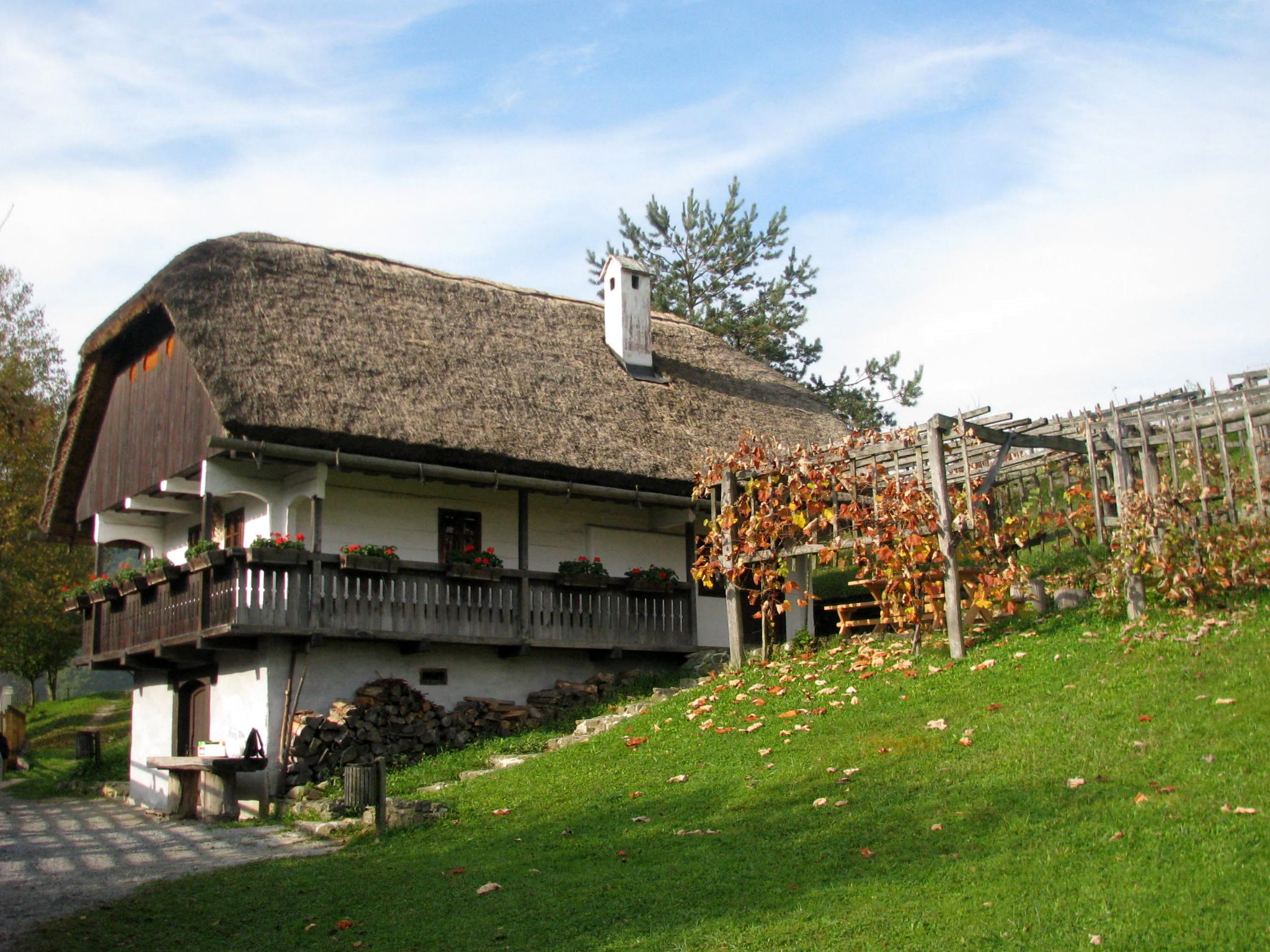 Open air museum, Rogatec, Slovenia